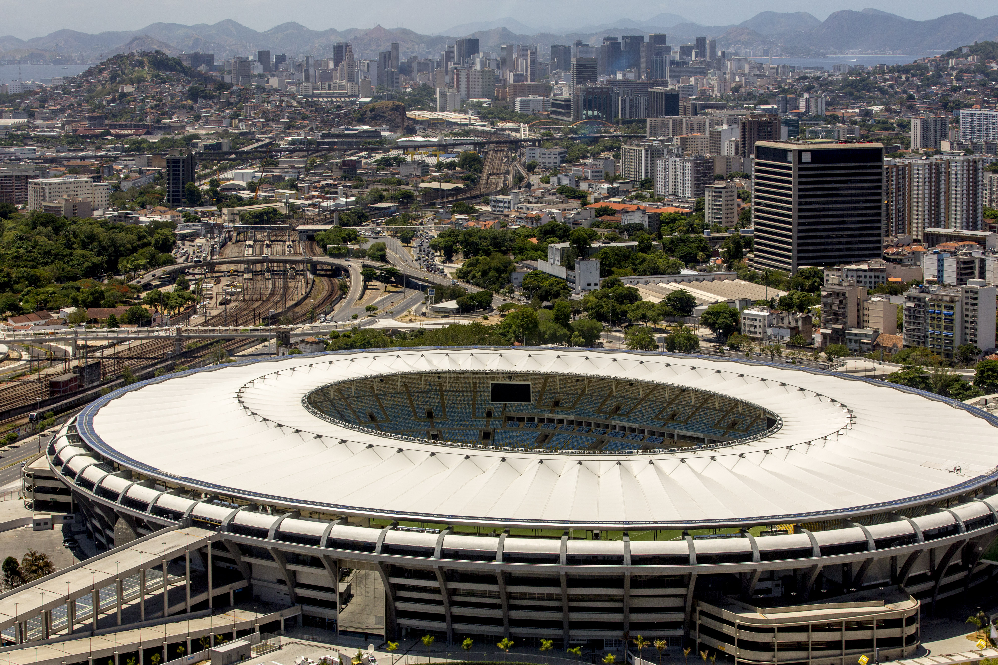 Estádio Jornalista Mário Filho, mais conhecido como Maracanã. Foto de fevereiro de 2014.